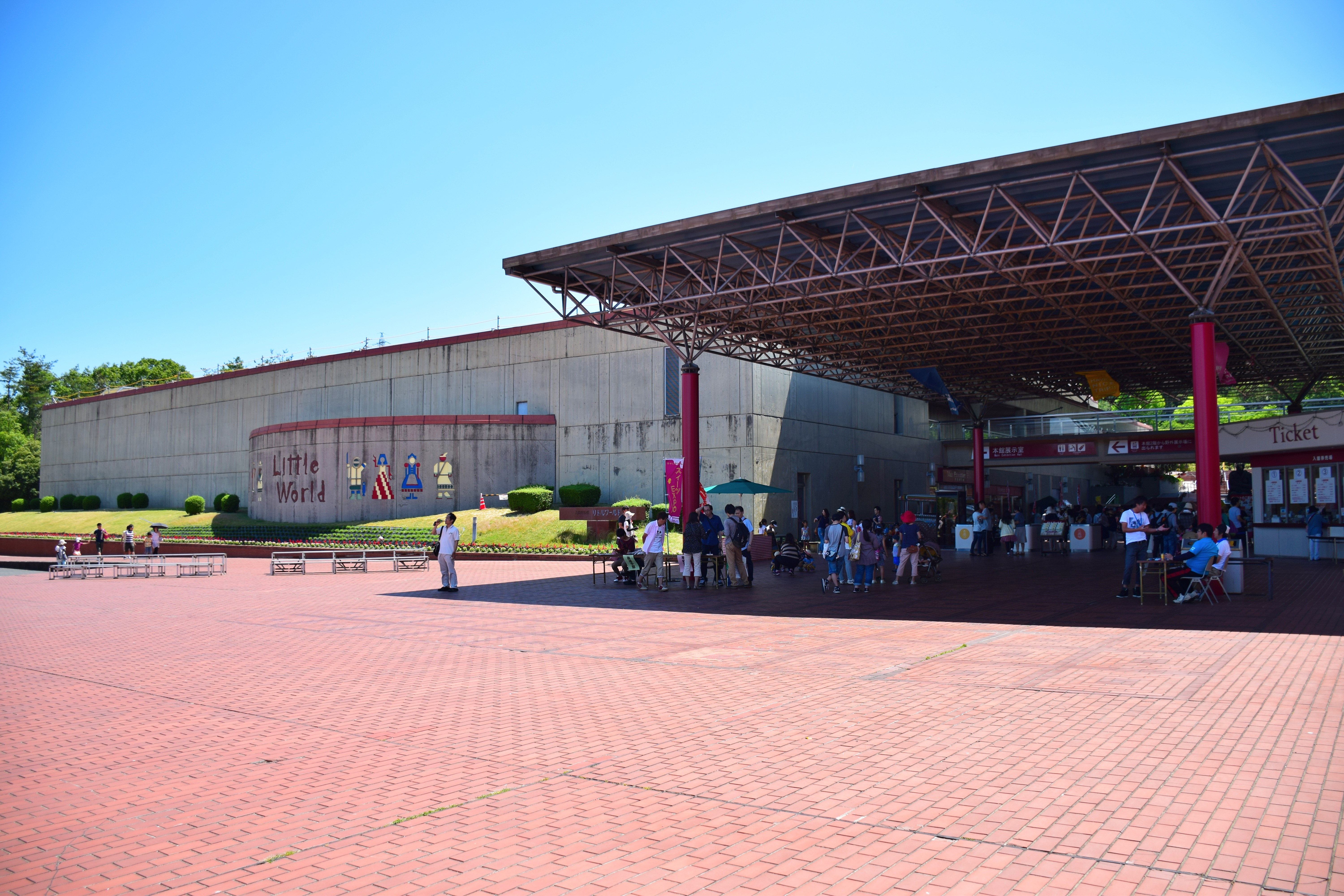 リトルワールド入口